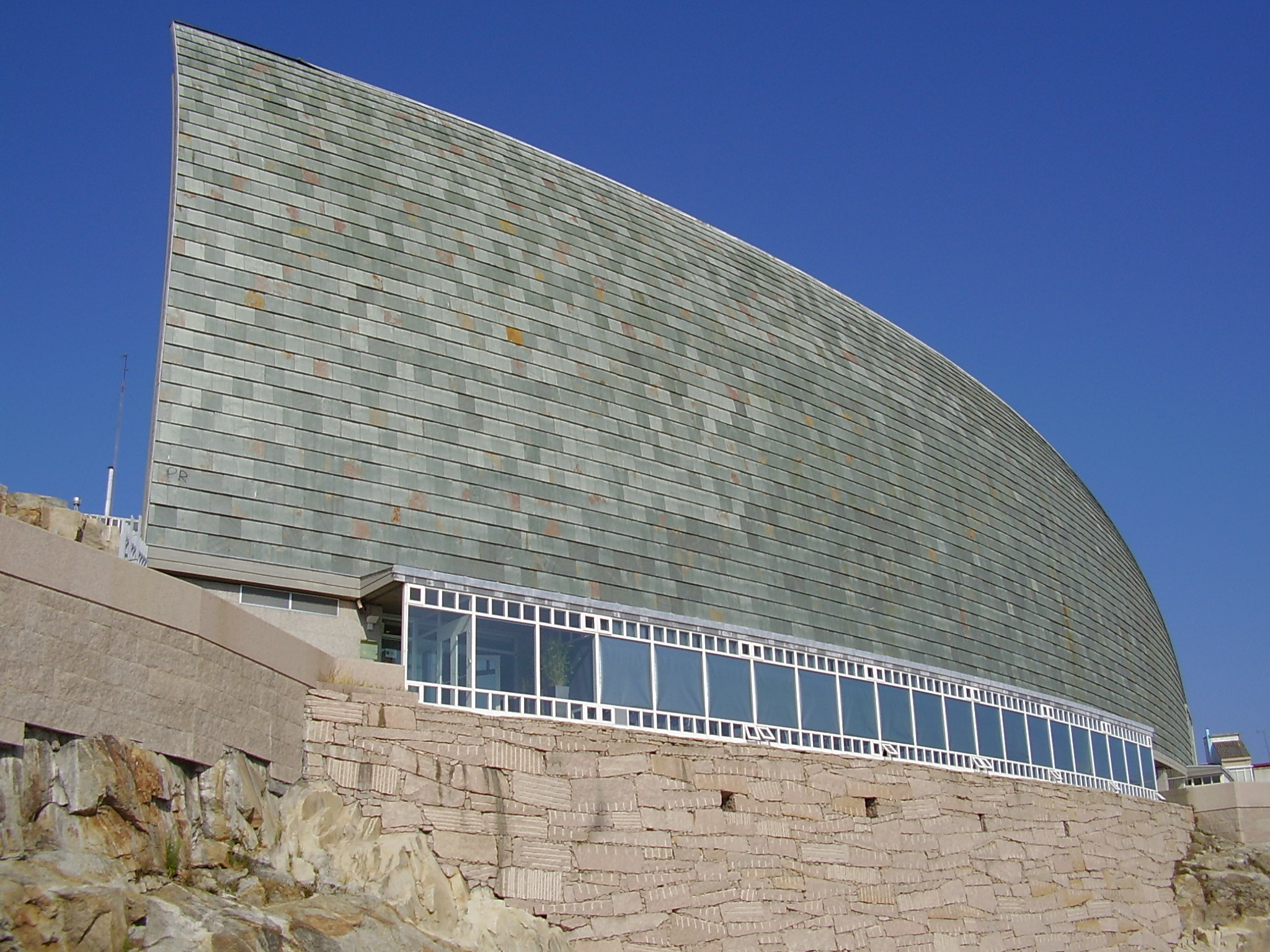 Domus, la Casa del Hombre, museo científico de La Coruña